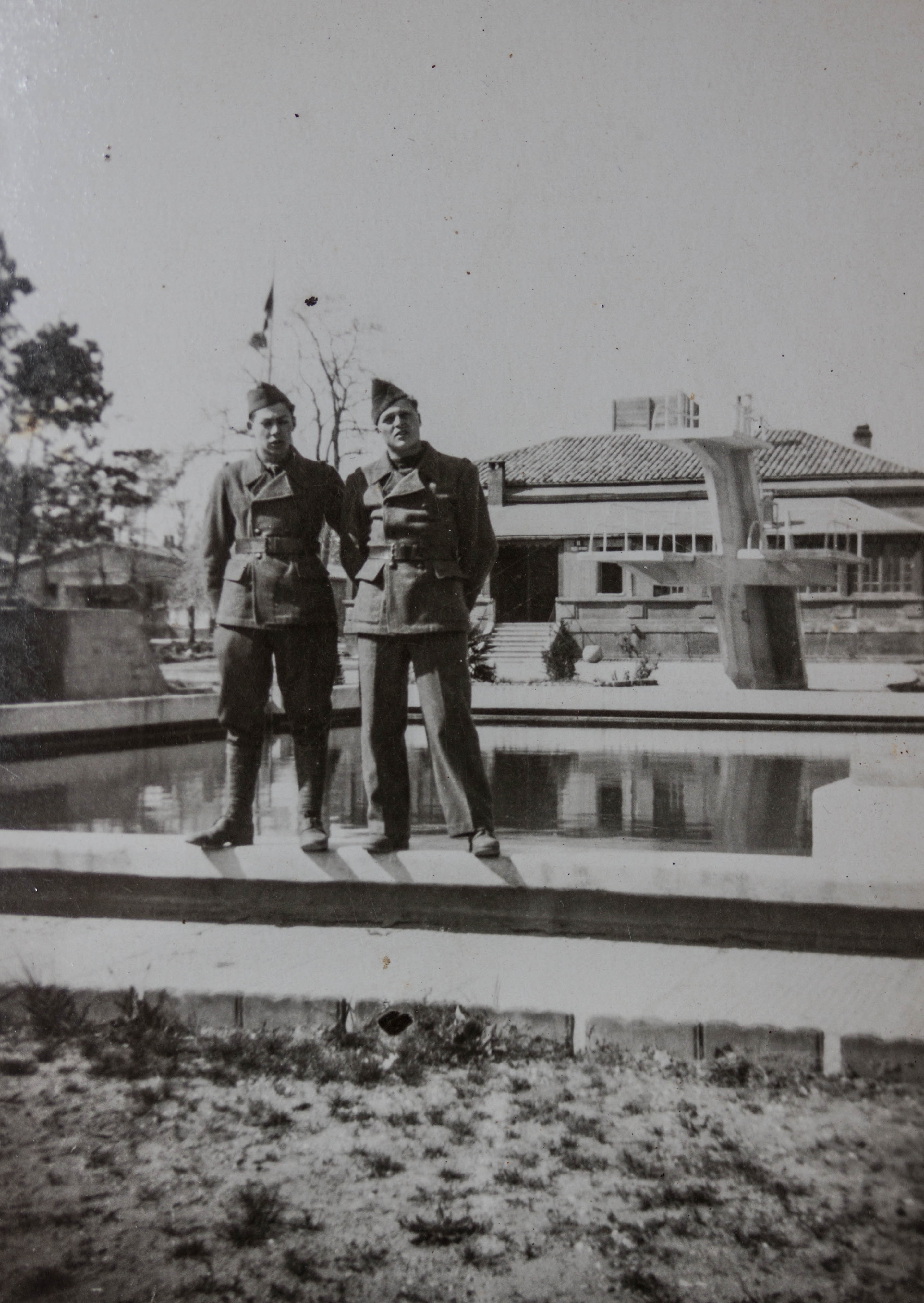 Camp de Stéhelin, Caudéran, 8 mars 1945